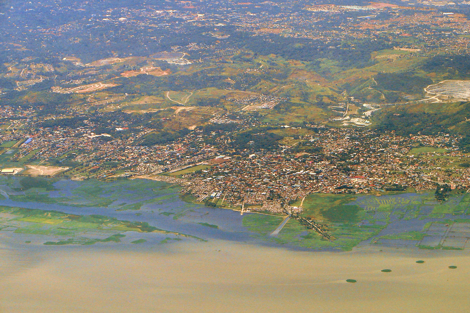 Angono, Rizal, Philippines